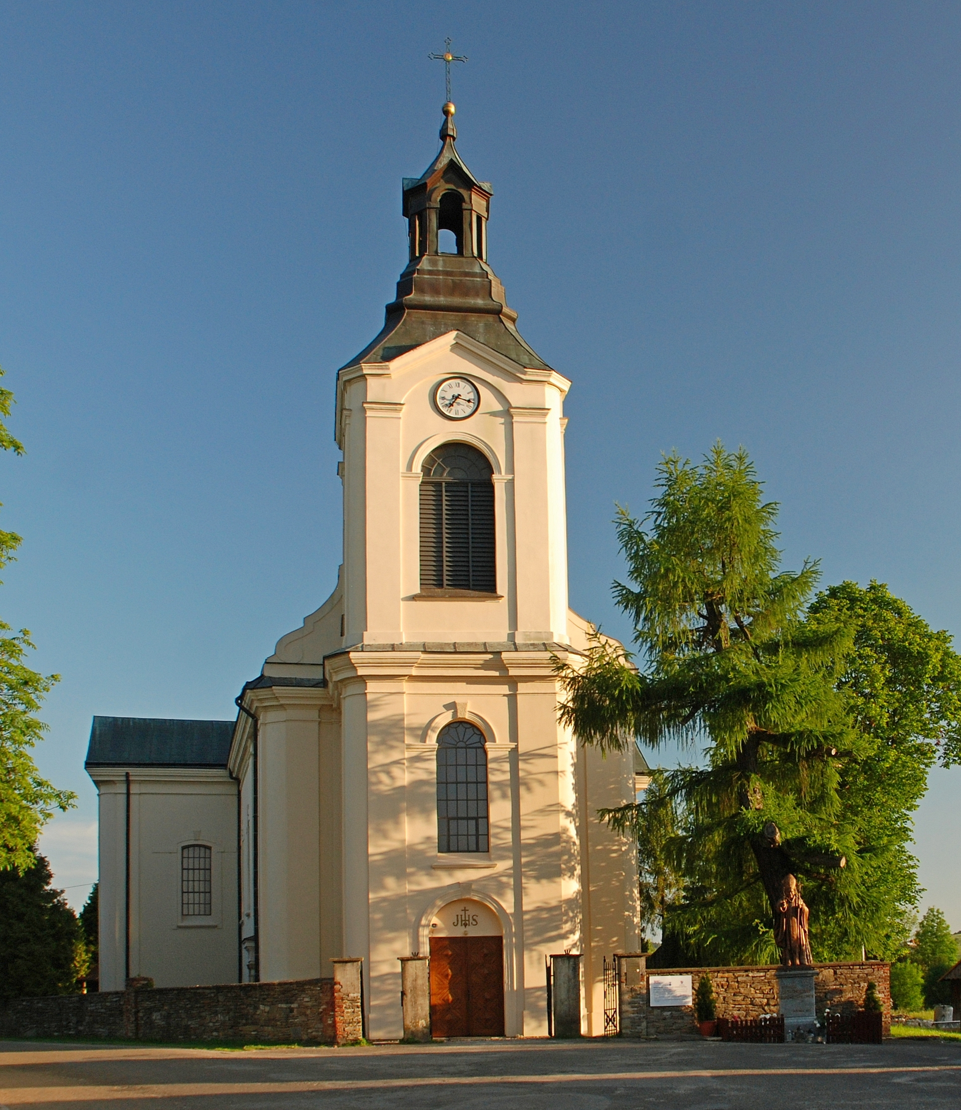 wieś Jaśliska